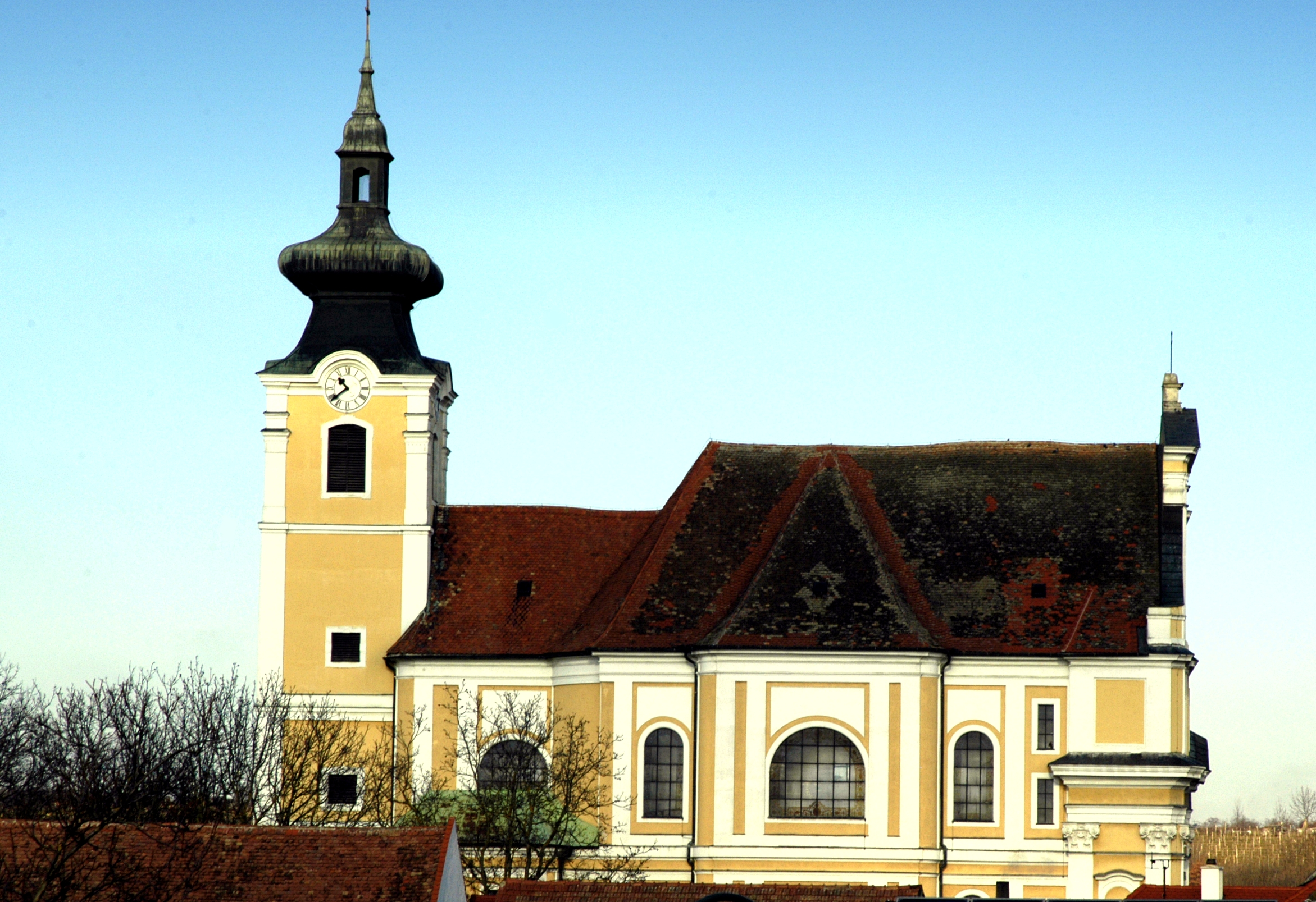 Kath. Pfarrkirche Mariae Himmelfahrt in Straning / Ansicht von Süden